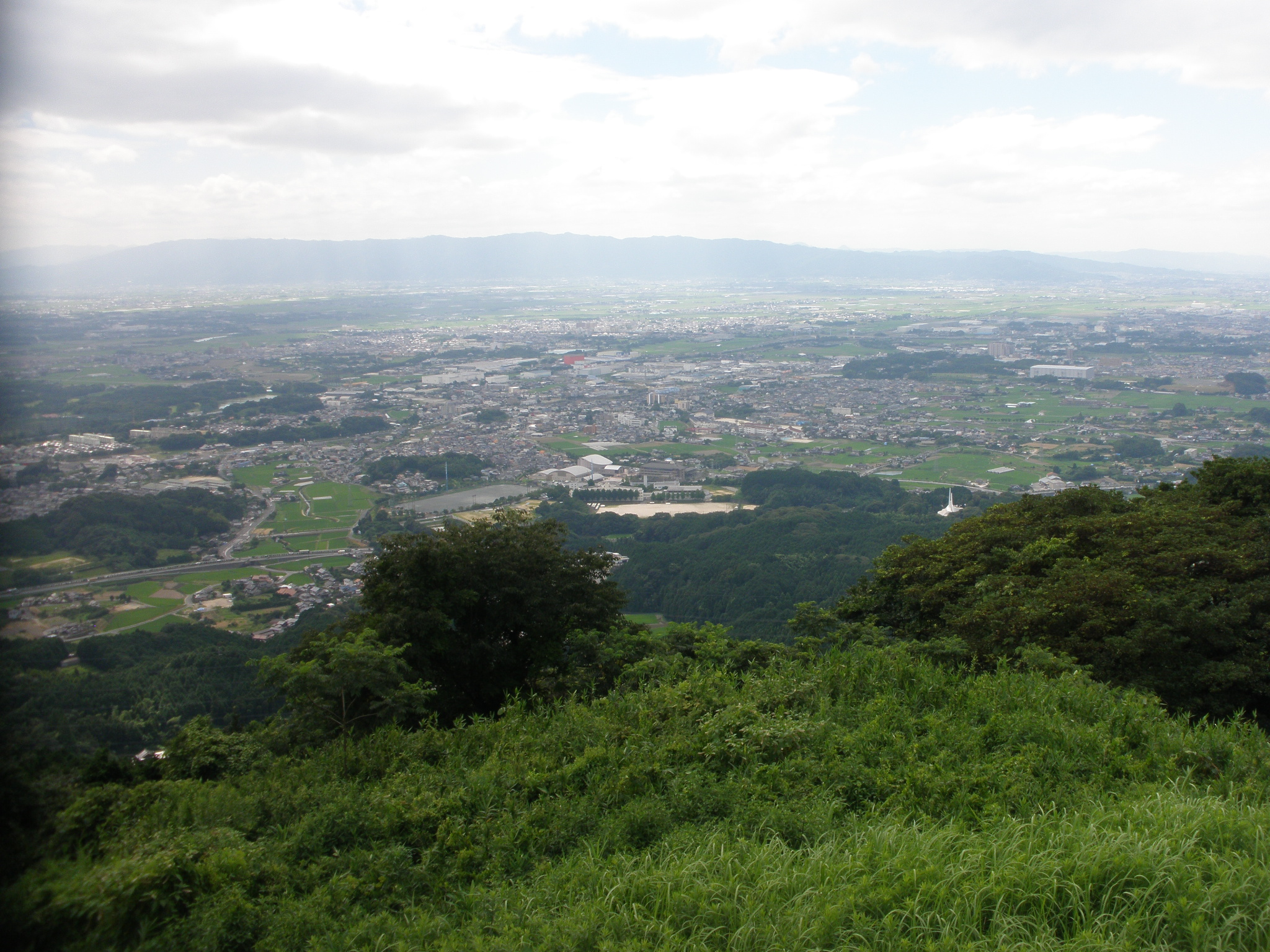 基肄城展望台から基山町、小郡方面を望む 左端手前がけやき台、中央左下の建物が役場・町民会館、正面遠方は耳納連山